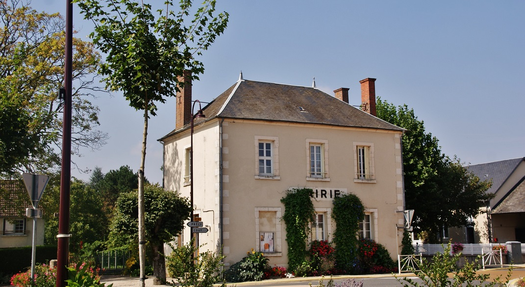 La Mairie